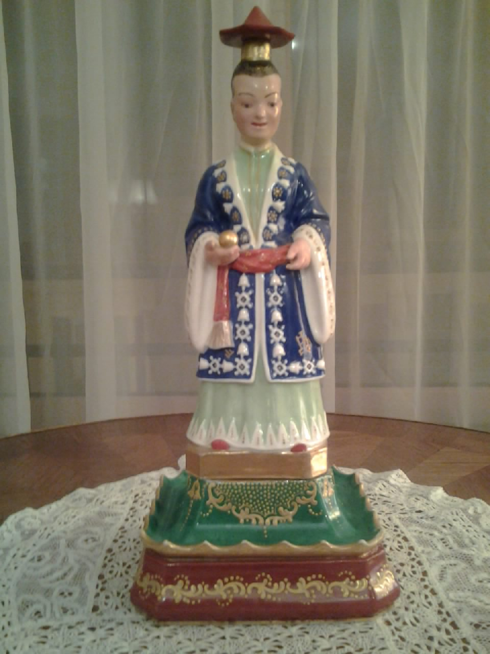 Flacon à parfum en porcelaine de Paris, représentant une chinoise, par Jacob PETIT (1796-1868).